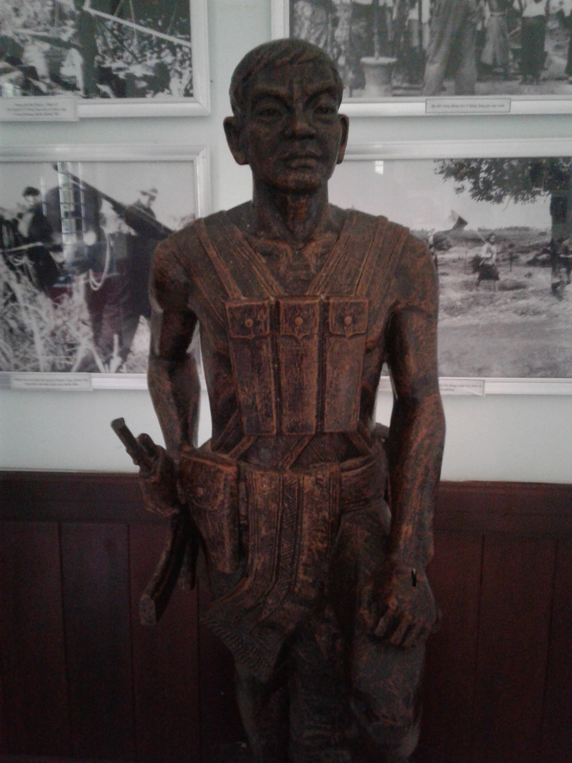 Tượng Anh hùng lực lượng vũ trang Điểu Ong tại Khu bảo tồn văn hóa dân tộc S'tiêng sóc Bom Bo